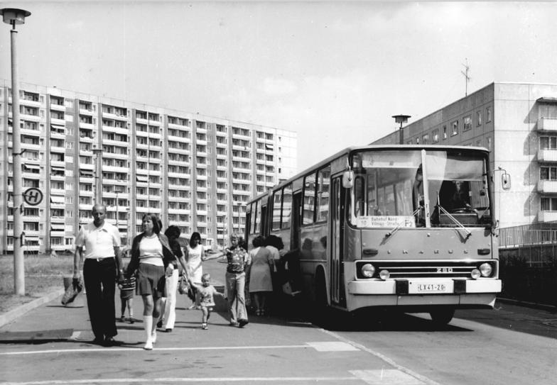 Erfurt, Rieth, Bushaltestelle, Omnibus ADN-ZB Ludwig 12.11.1975 Erfurt: Moderne Nahverkehrsmittel verbinden das Riethviertel mit dem Stadtzentrum.